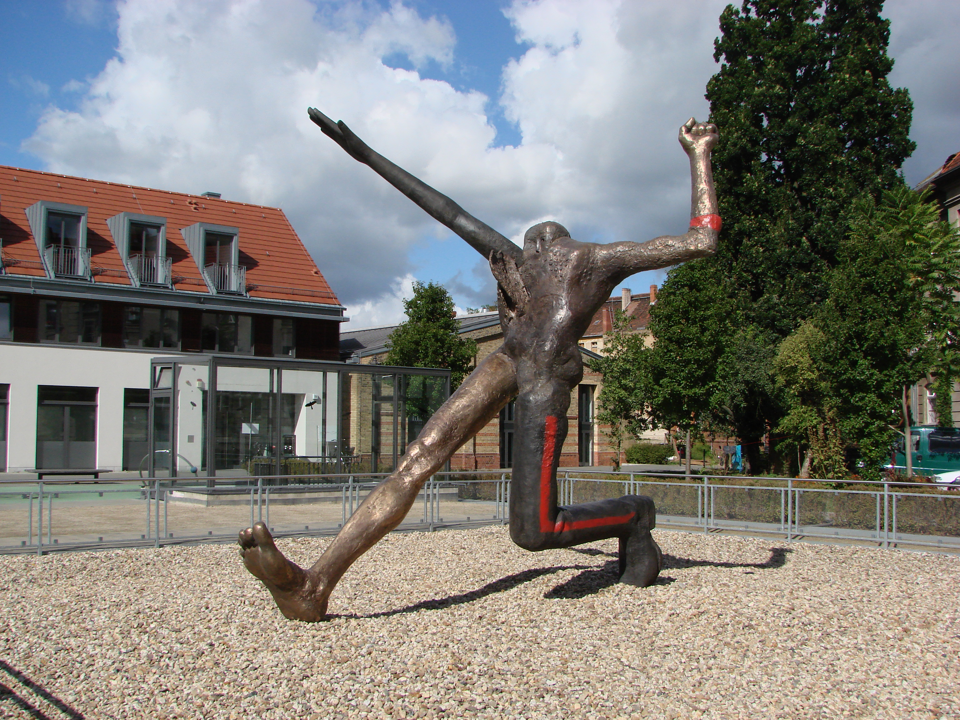 Bronzeplastik "Jahrhundertschritt" von Wolfgang Mattheuer. Plastik war im Sommer 2012 auf dem Hof des Kutschstalls in Potsdam ausgestellt. Es stammt aus der privaten Sammlung von Hasso Plattner